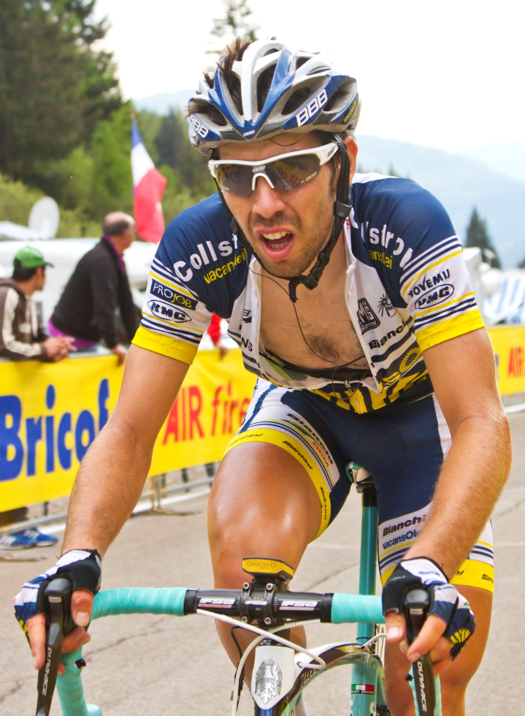 123 pampeago de gendt